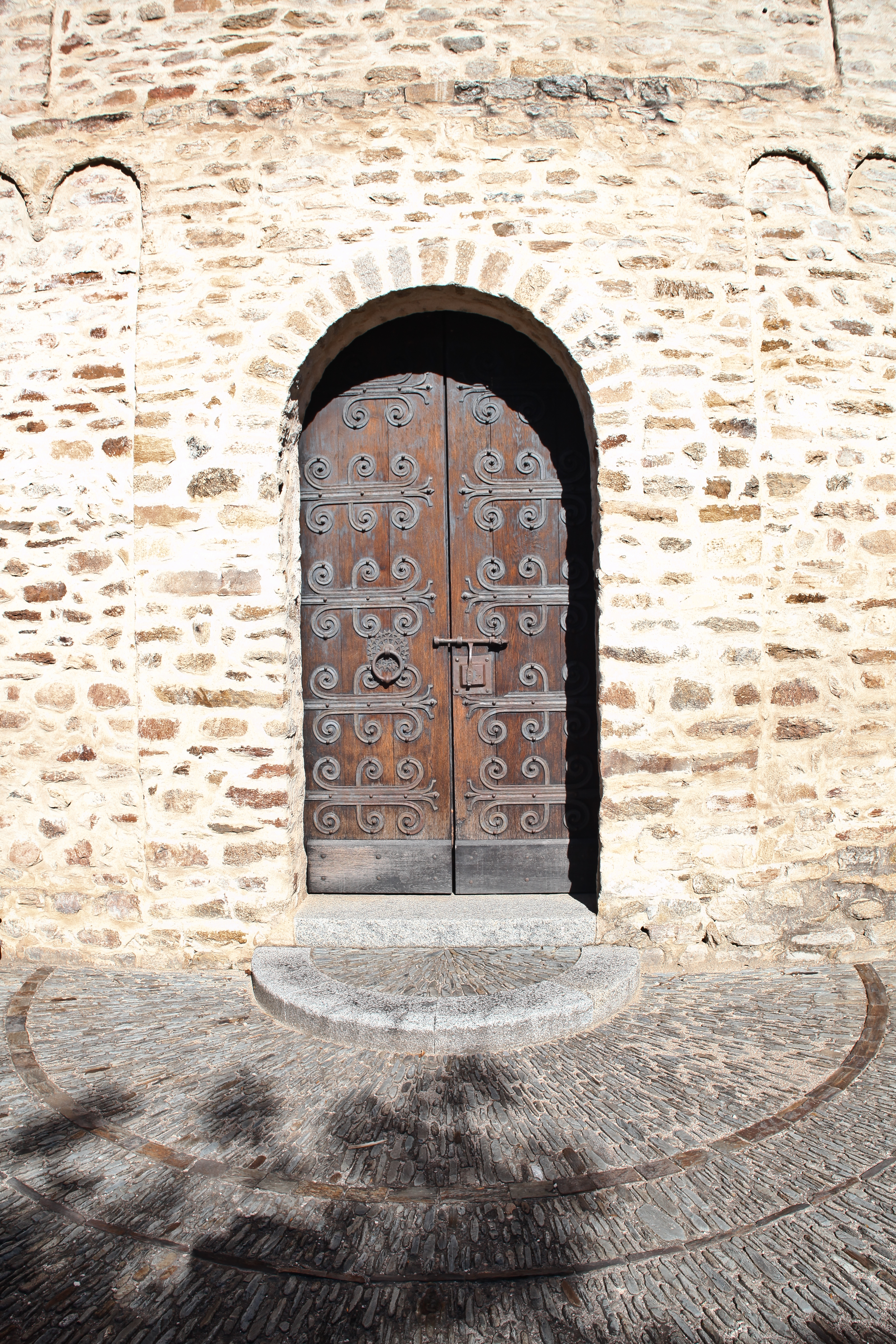 Église Sainte-Eulalie de Fuilla (Classé) .